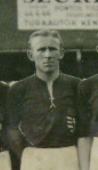 János Dudás (ca. 1936-38)